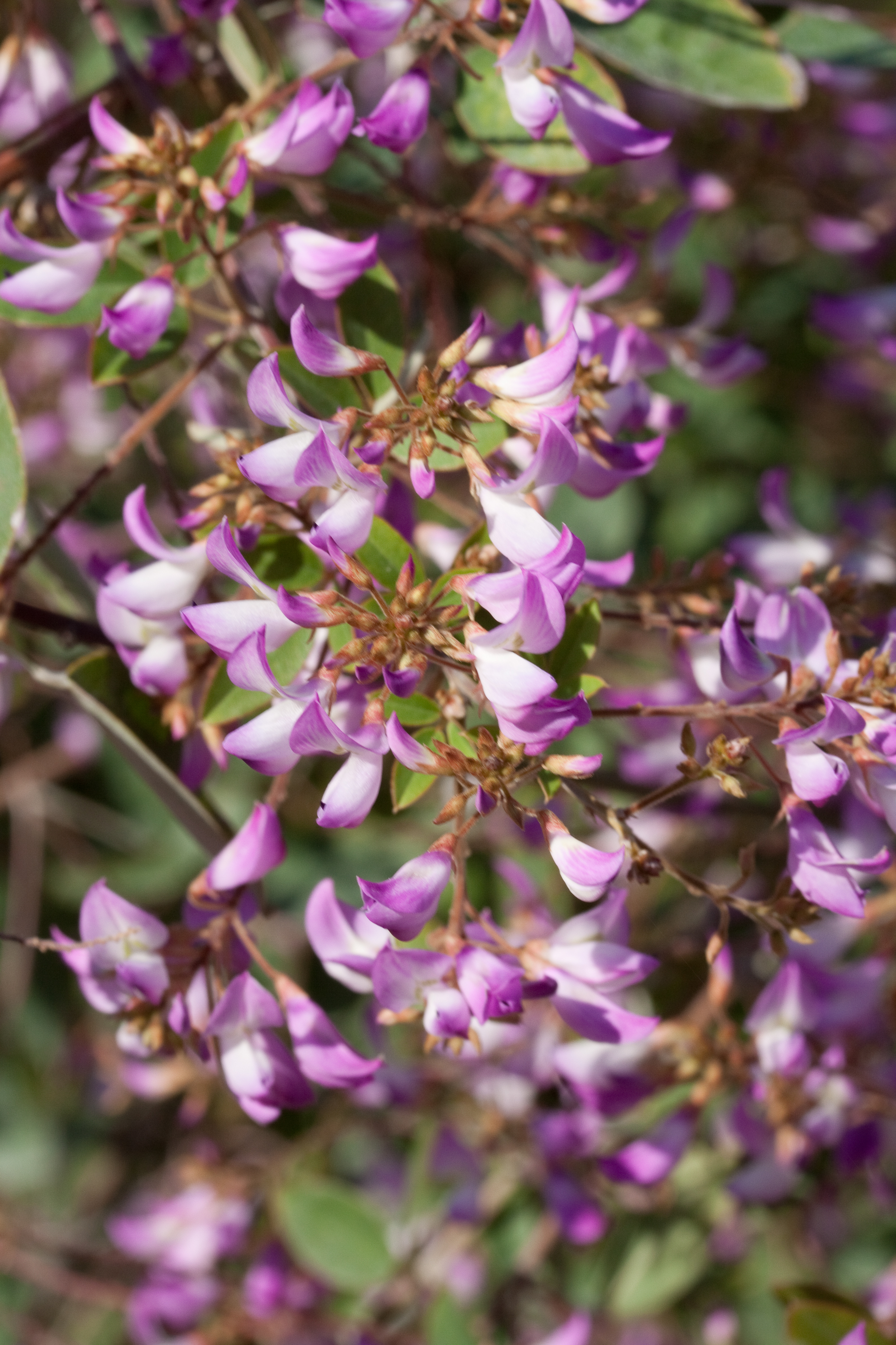 Fleurs de Campylotropis macrocarpa - Jardin des Plantes - Paris